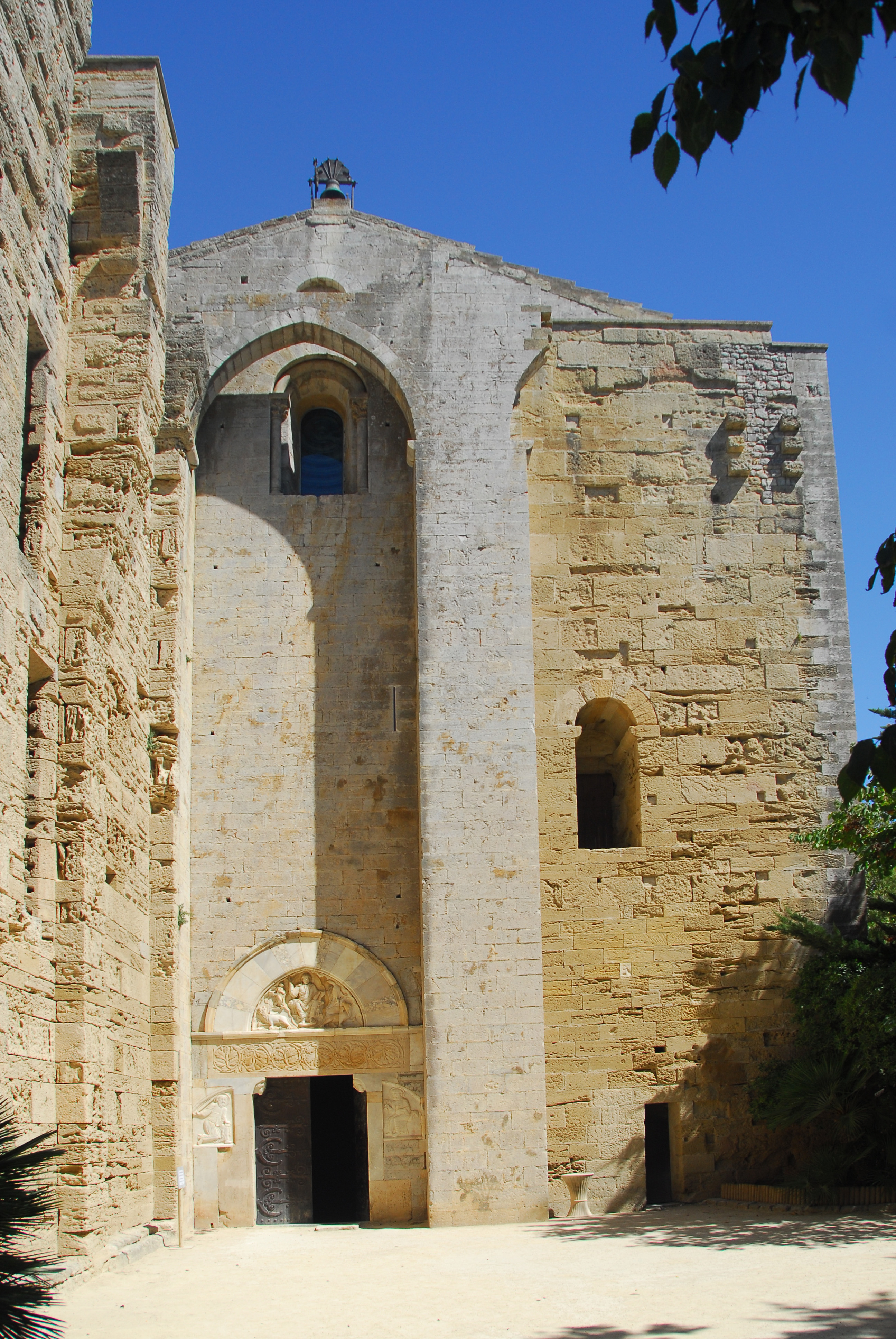 St-Pierre-et-St-Paul de Maguelone, Fassade mit Hauptportal von W